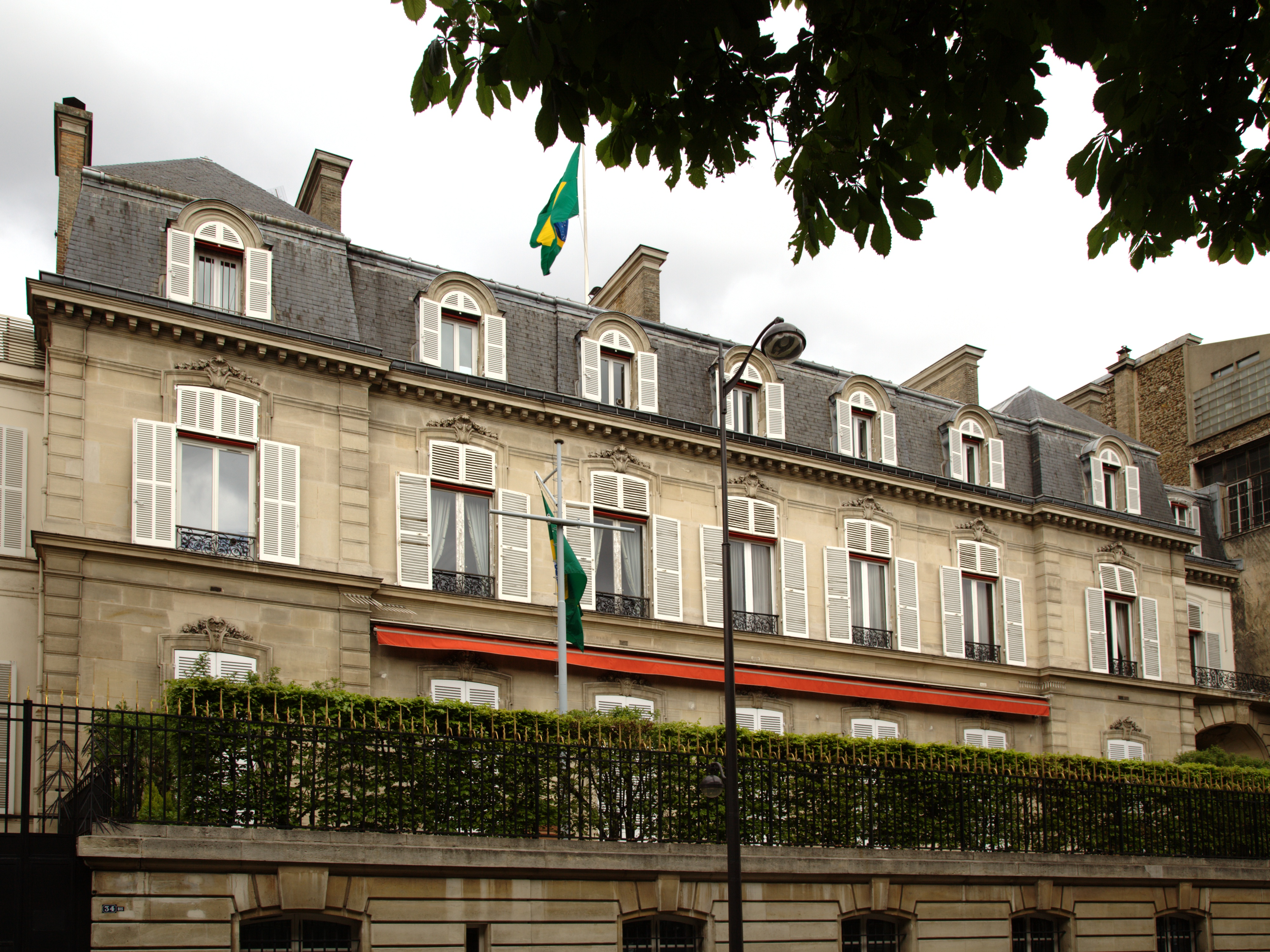 Les numéros 34 et 34bis du cours Albert-1er à Paris, aujourd'hui ambassade du Brésil